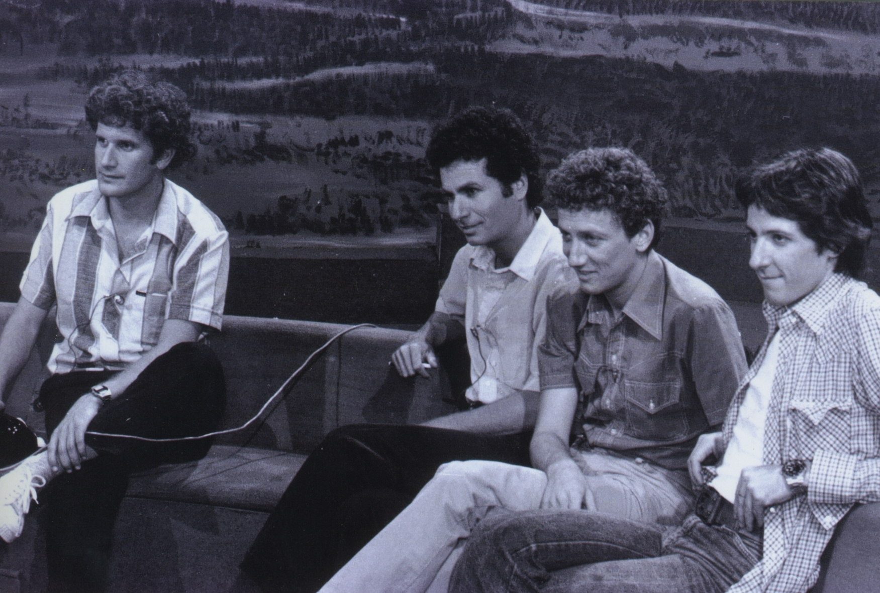 מנחי התוכנית זהו זה! השנים הראשונות גידי גוב, מוני מושונוב, שלמה בר-אבא ודליק ווליניץ